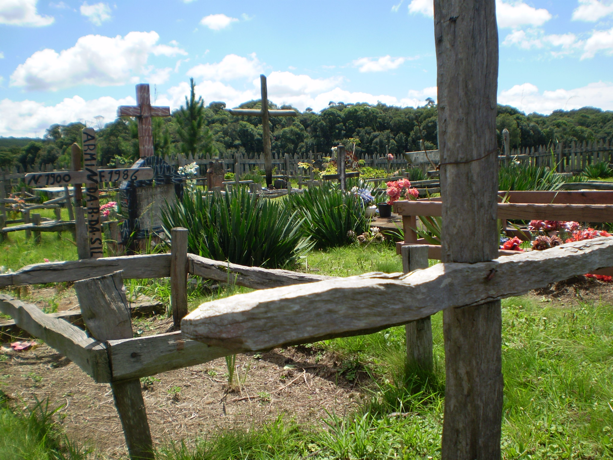 fotografia in loco do cemitério do contestado, Santa Catarina